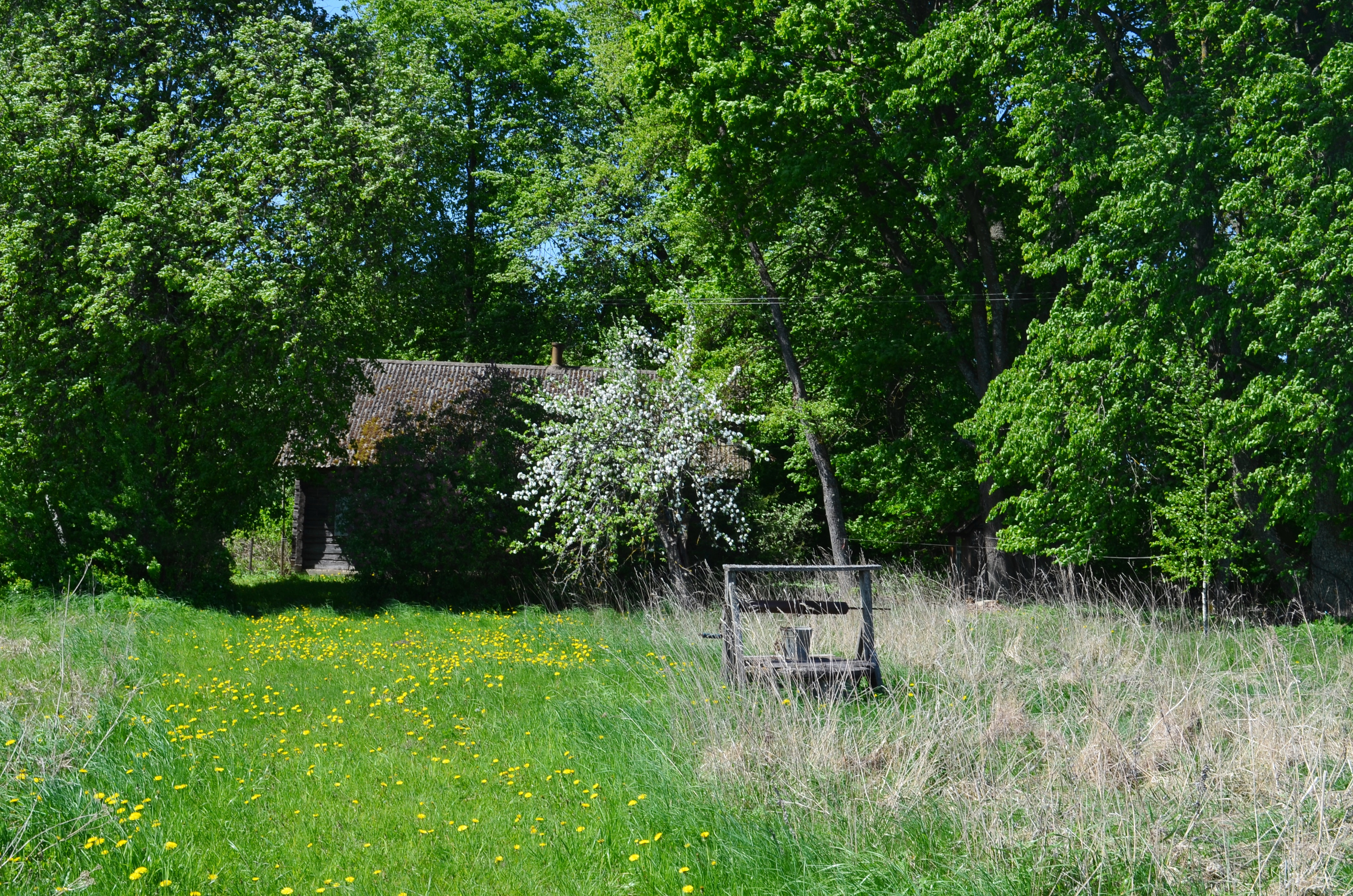 Pakalniai, Kavarsko sen., Anykščių raj.